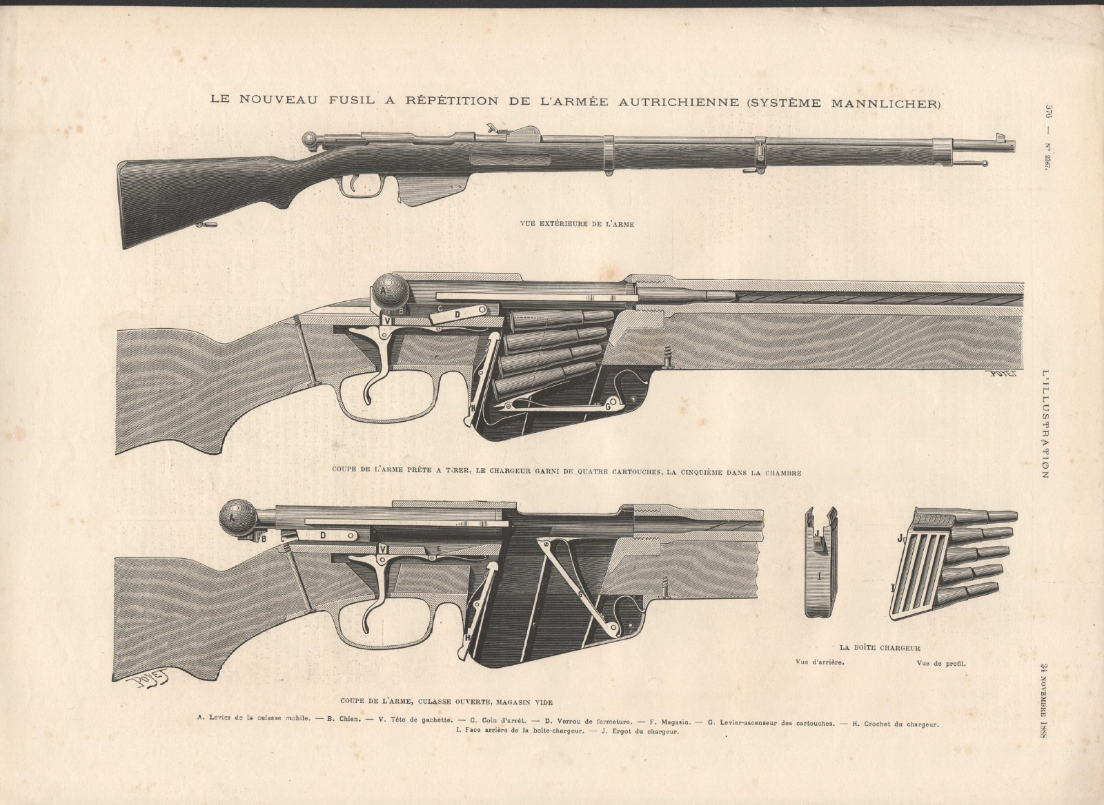 Skica puške Mannlicher M1886 iz francoskega časnika L'Illustration.